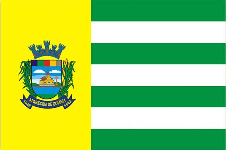 Bandeira de Aparecida de Goiânia retirada do site Aparecidanet